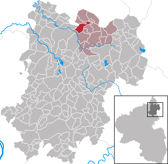 Norken in Rhineland-Palatinate - Westerwaldkreis